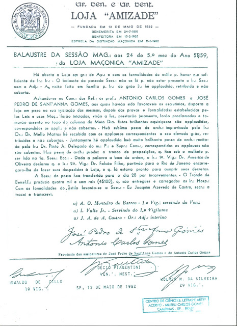 O maestro Carlos Gomes, foi iniciado na primeira Loja de São Paulo, a Loja Amizade, na época vinculada ao Grande Oriente Brasileiro, juntamente com seu irmão biológico.